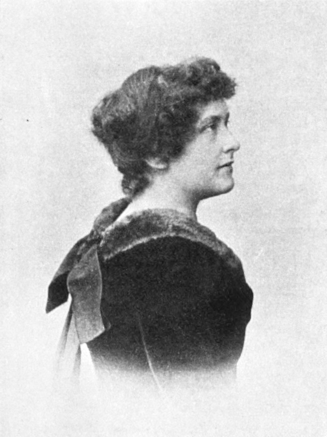 Portrait der deutschen Schriftstellerin Maria Janitschek.